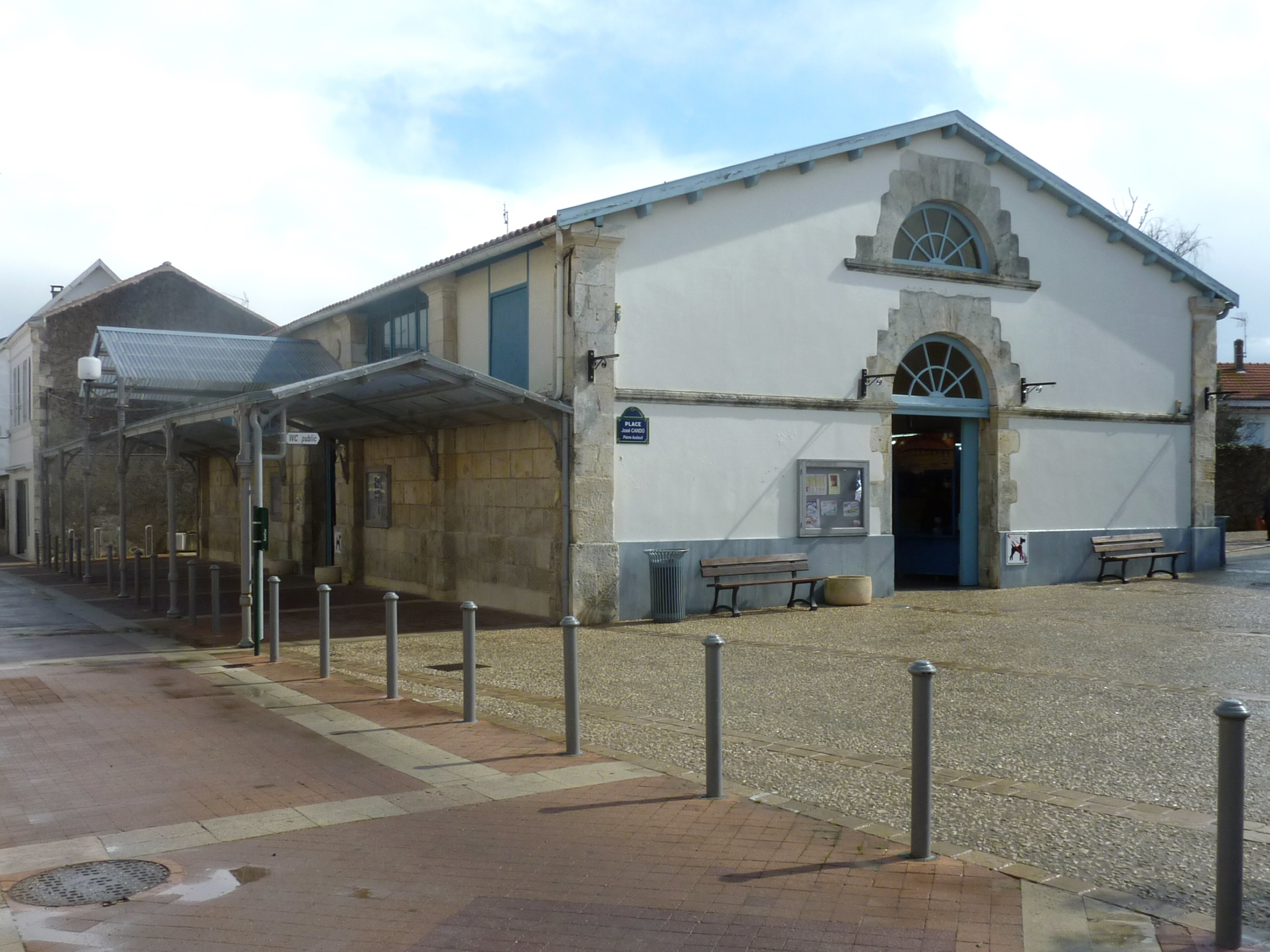 Halle aux poissons Fouras Charente Maritime France